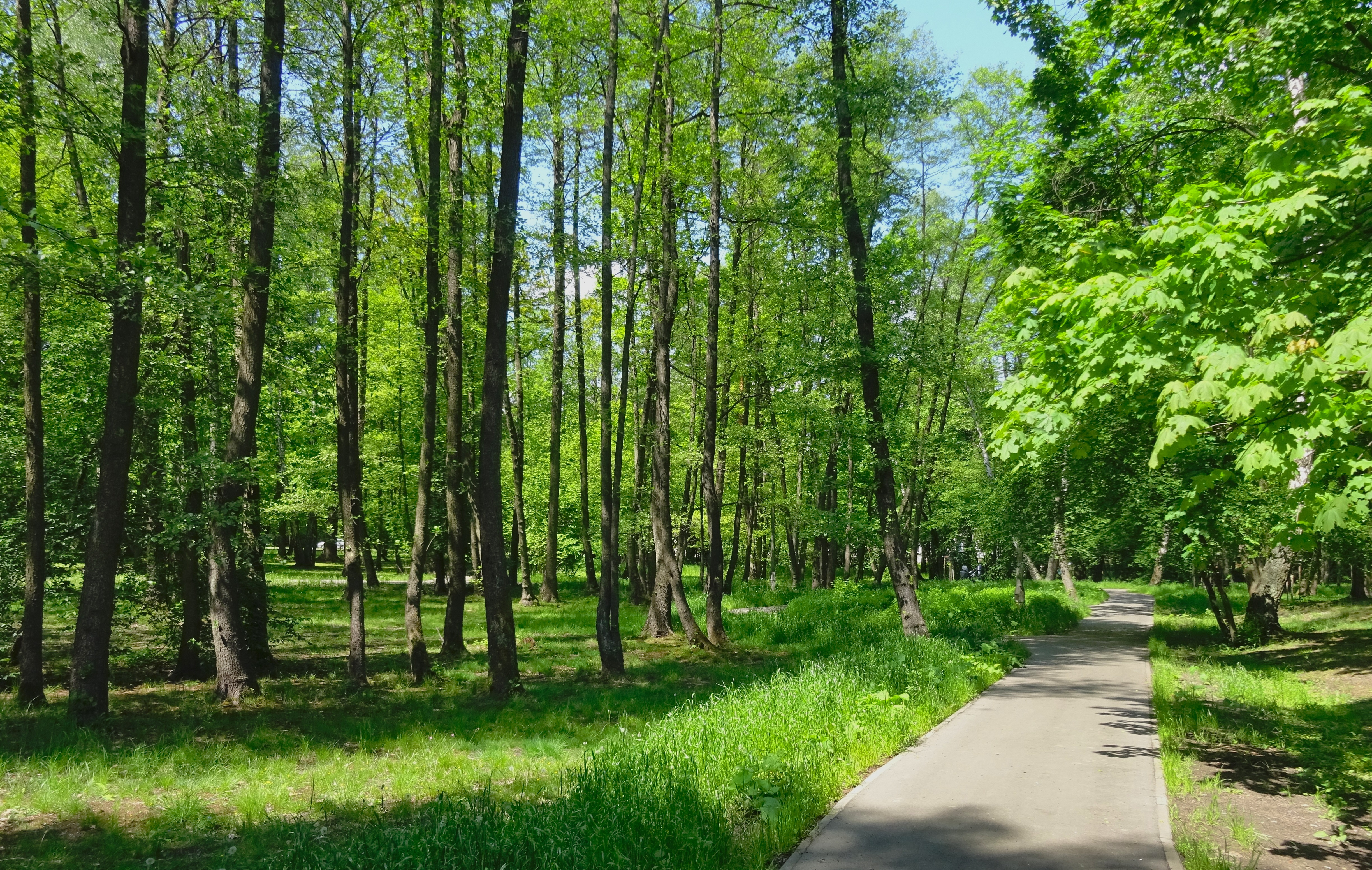 Park Solvay w Krakowie. Część Leśna, widok w kierunku północnym.